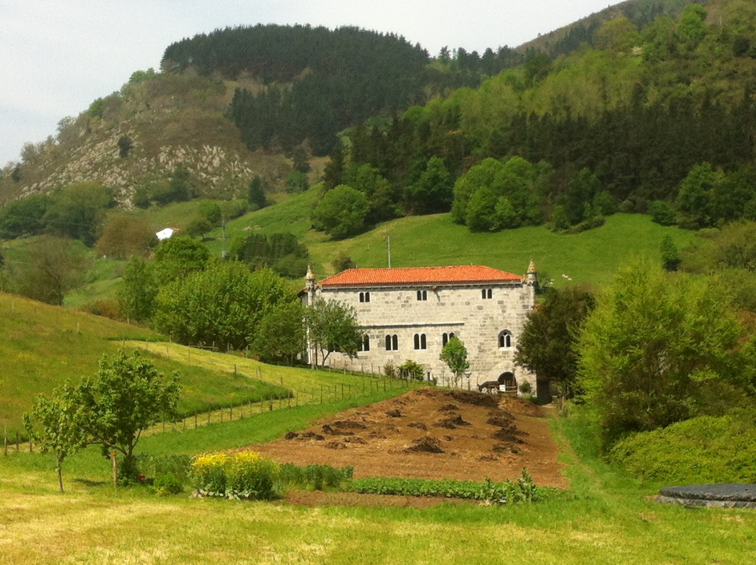 Lili jauregiaren hego fatxada (Zestoa, Gipuzkoa)